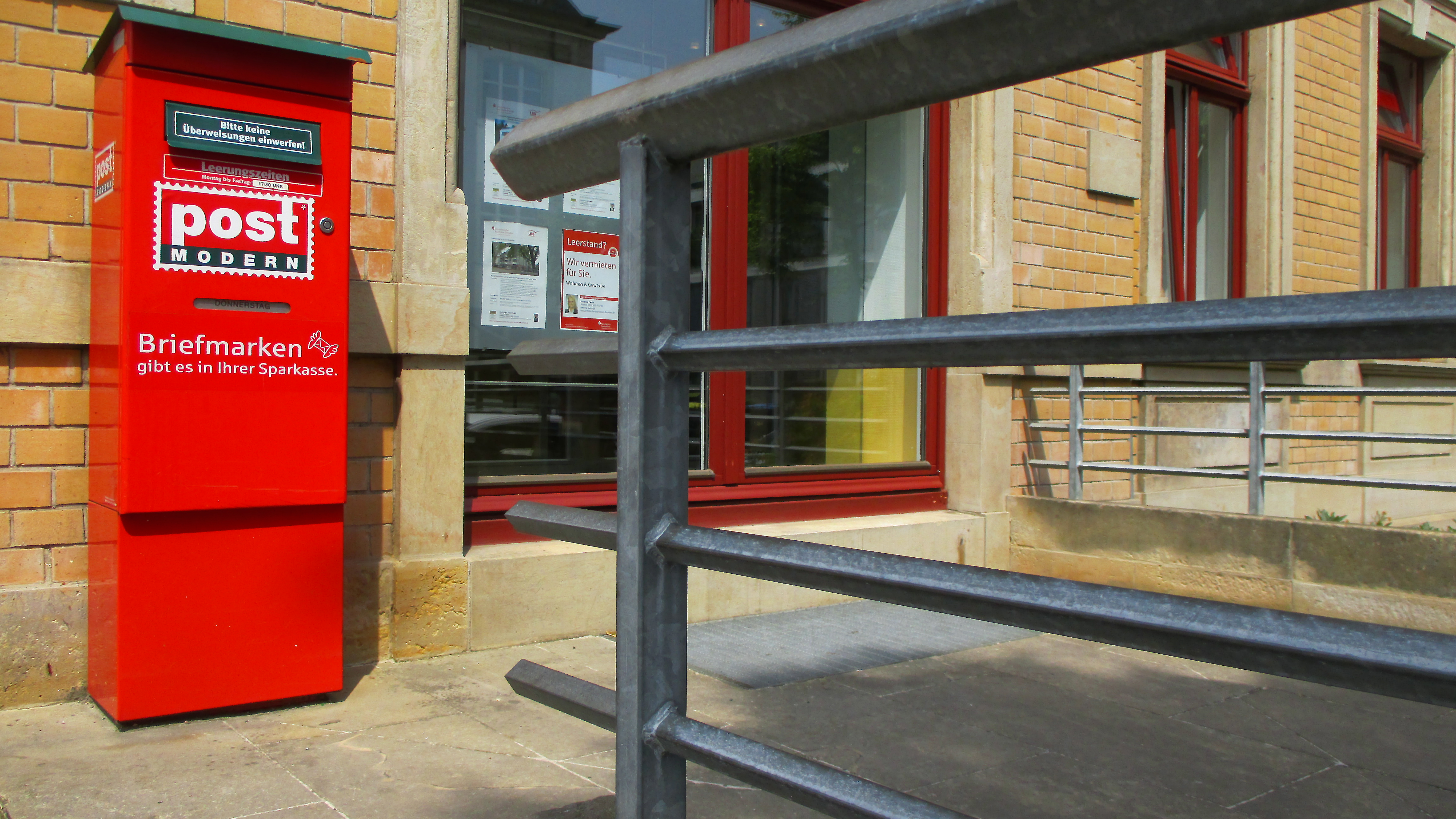 Postbriefkasten von Post Modern in Dresden-Striesen